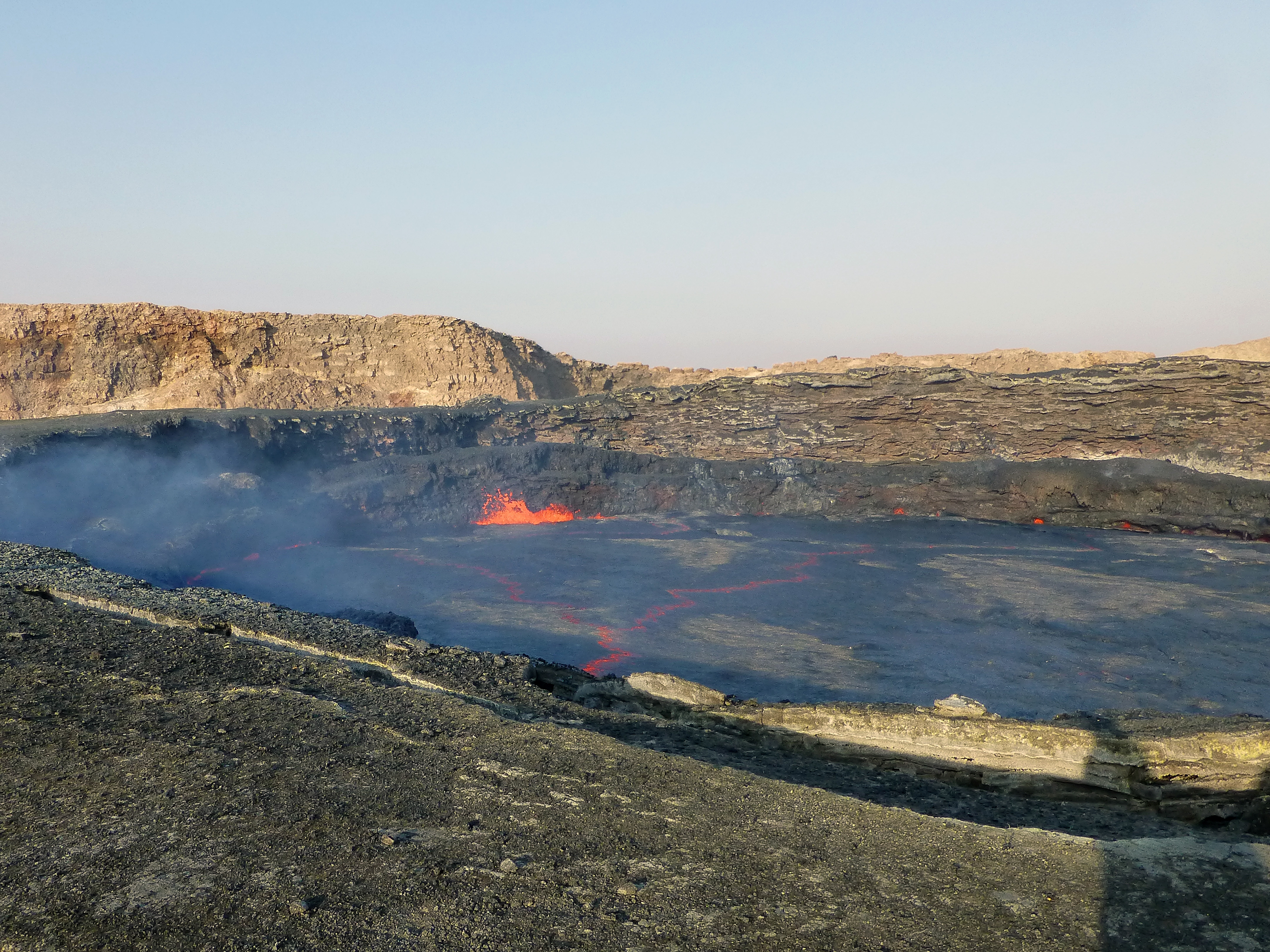 Lac de lave de l'Erta Ale (Ethiopie)